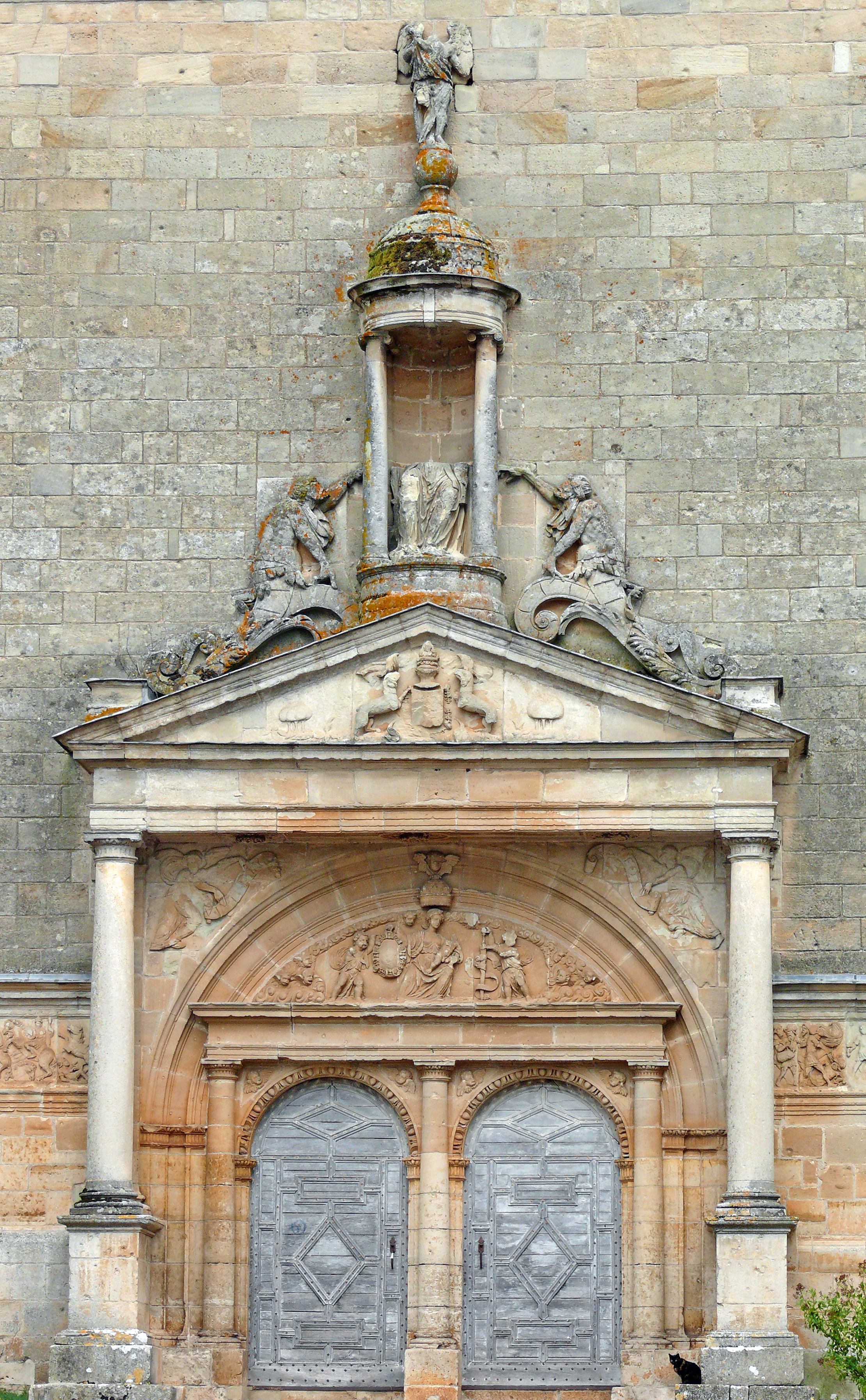 Assier - Église Saint-Pierre - Portail occidental